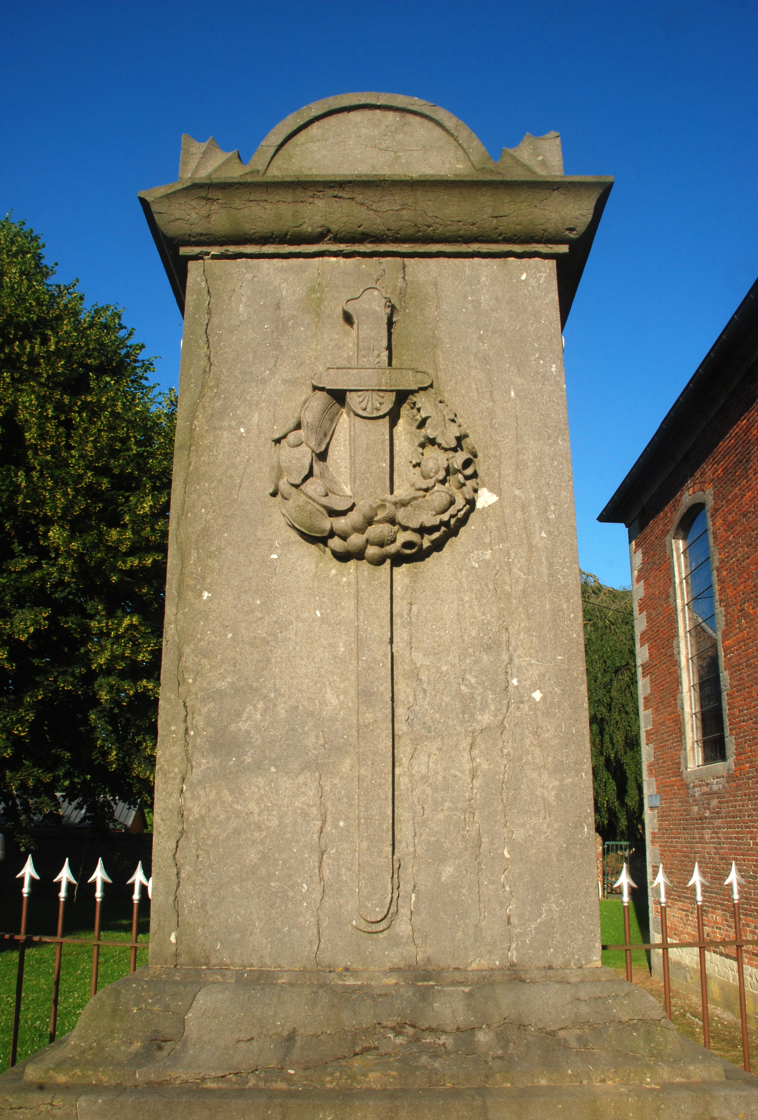 Belgique - Brabant wallon - Genappe - Ways - Mausolée Duhesme (tombe du Général Duhesme, mort des suites des blessures encourues à la bataille de Waterloo)